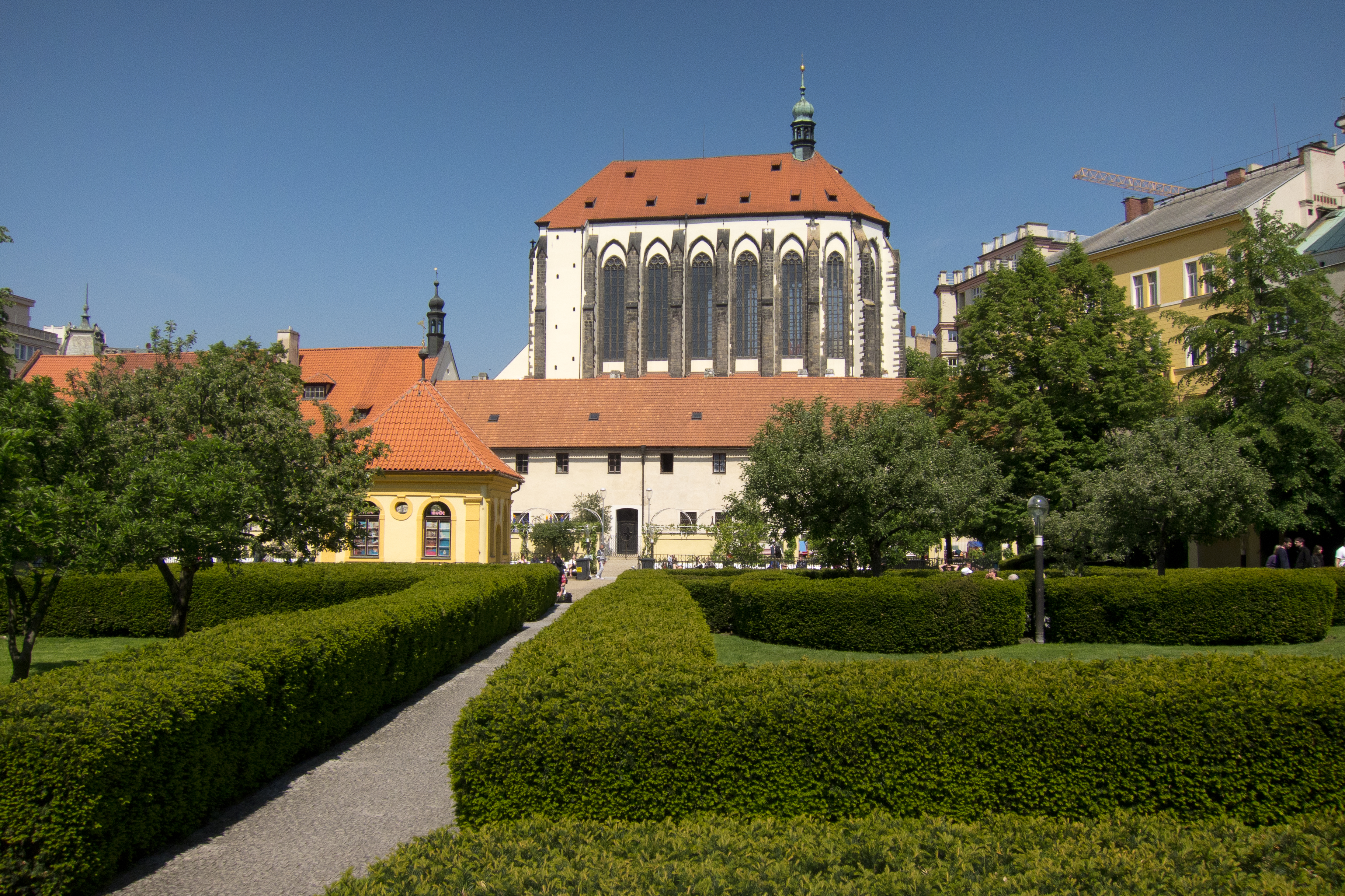 Praha, Nové Město, Františkánská zahrada a Kostel Panny Marie Sněžné